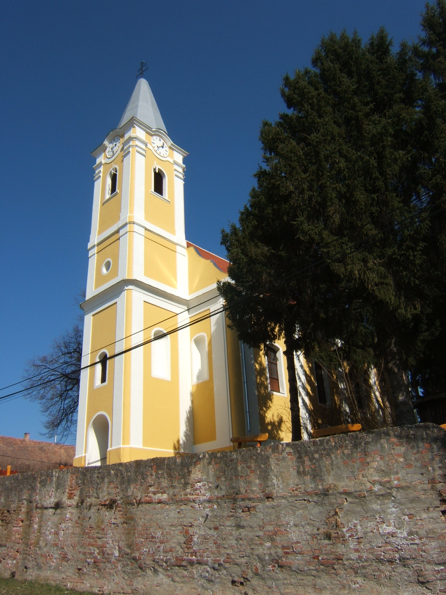 Tapsony, templom